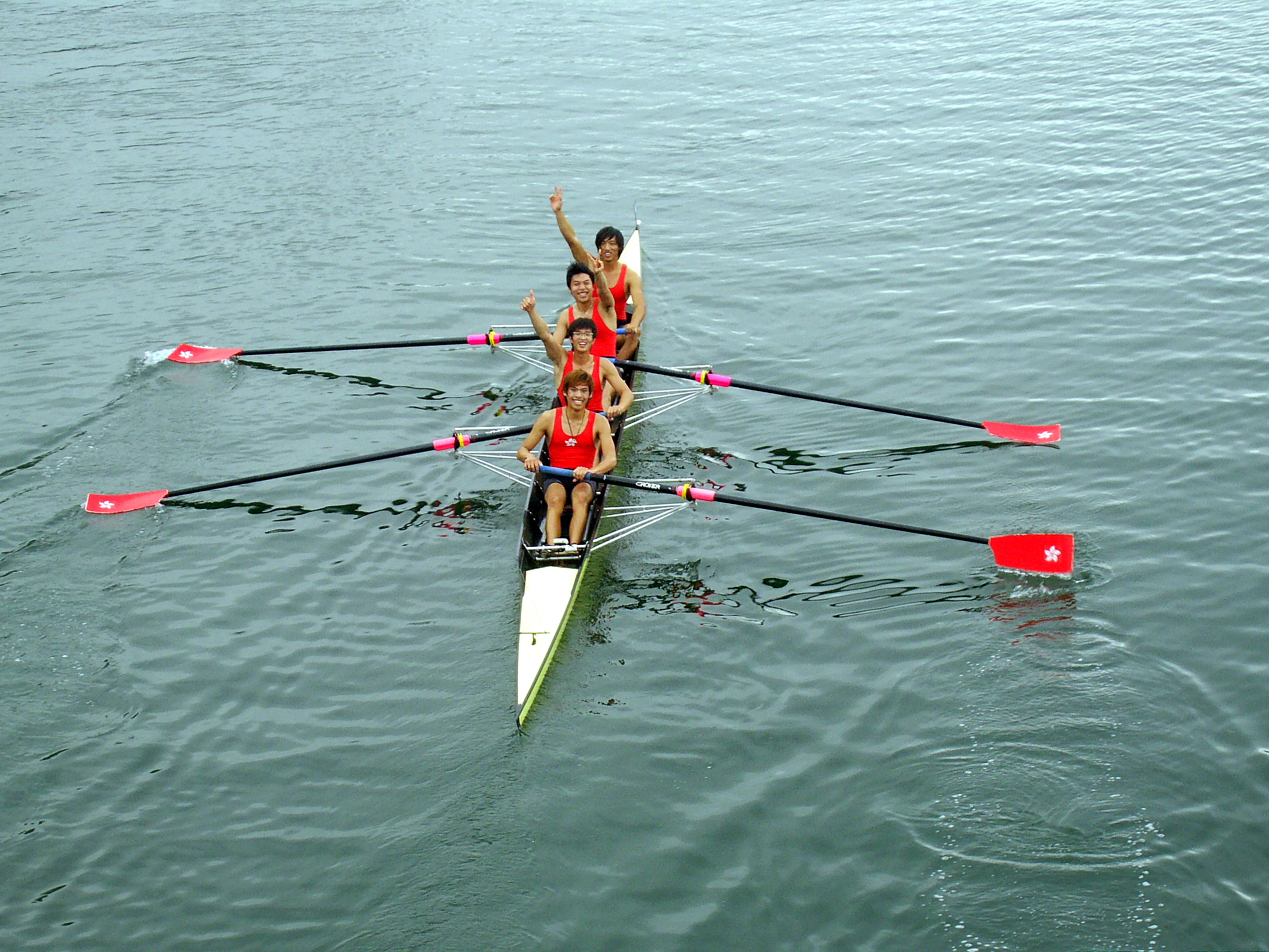 中文（香港）: 2009年東亞運動會男子四人無舵艇銀牌得主香港隊